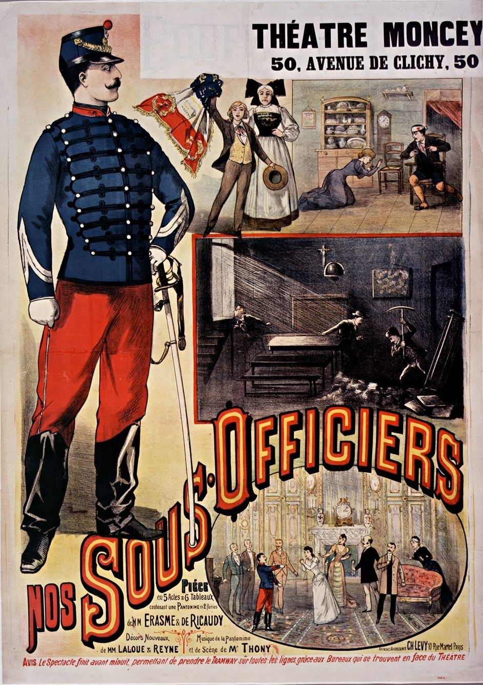 Théâtre Moncey, Nos Sous-officiers, affiche de la pièce en 5 actes & 6 tableaux de MM. Erasme et De Ricaudy